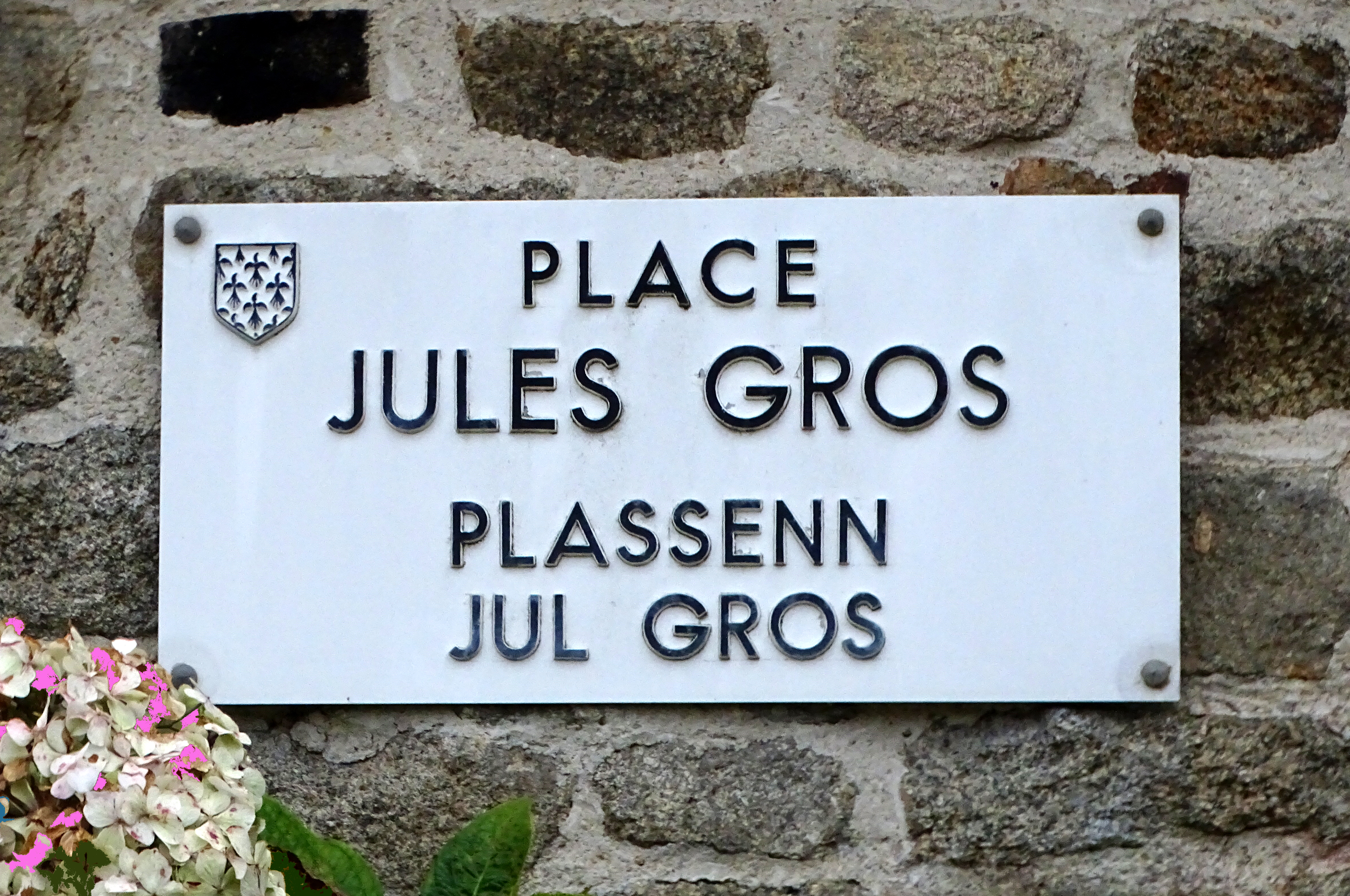 Tredraezh-Lokemo. Plakenn Jul Gros